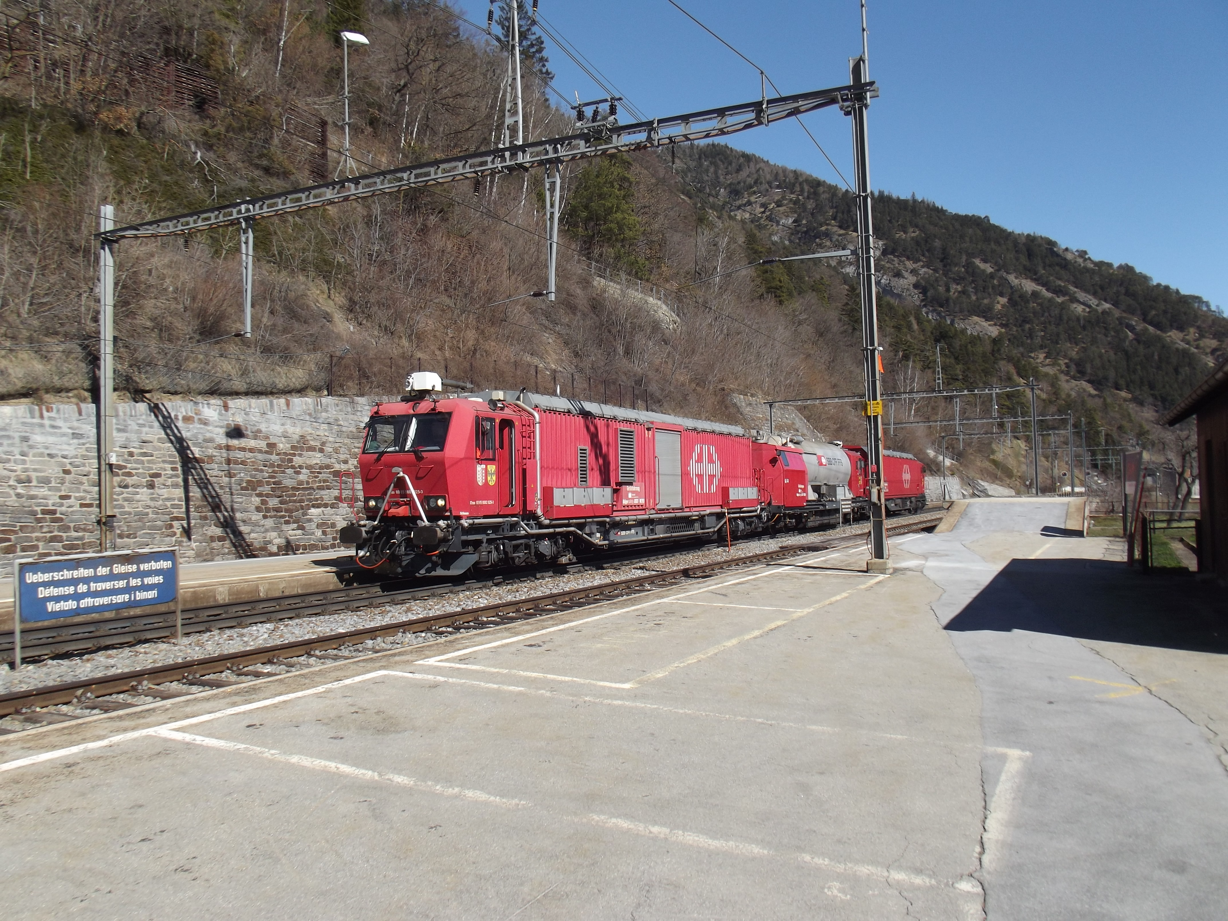 Een spooronderhoudtrein in Hohtenn